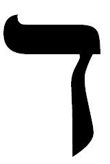 hebrew letter dalet